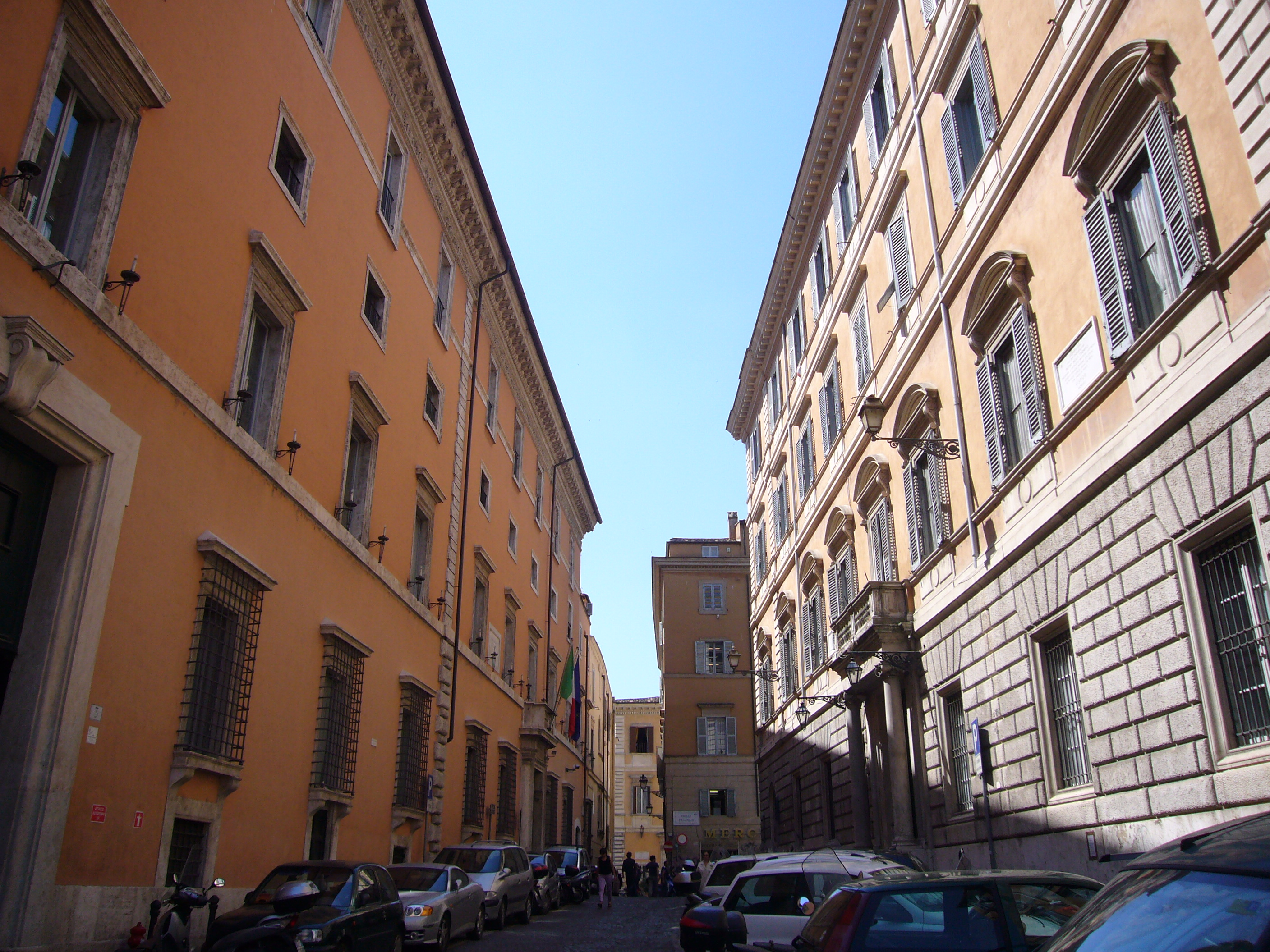 Roma, piazza dell'Enciclopedia italiana. A sinistra, palazzo Mattei Paganica.